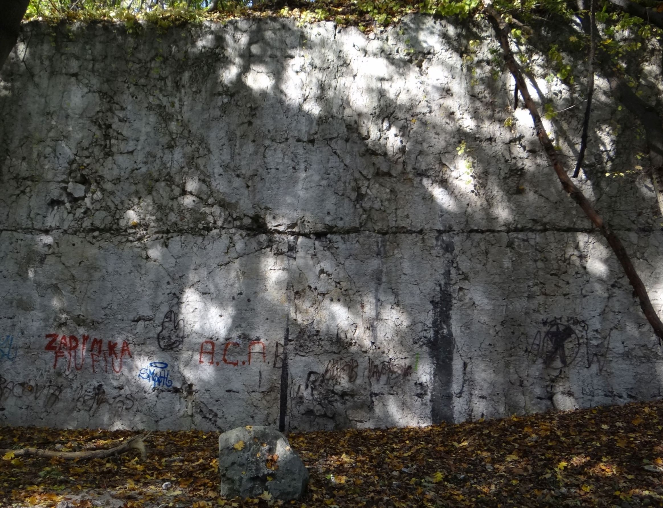 Mur skalny "Esteci" w dawnym kamieniołomie pod św. Benedyktem na Krzemionkach Podgórskich w Krakowie